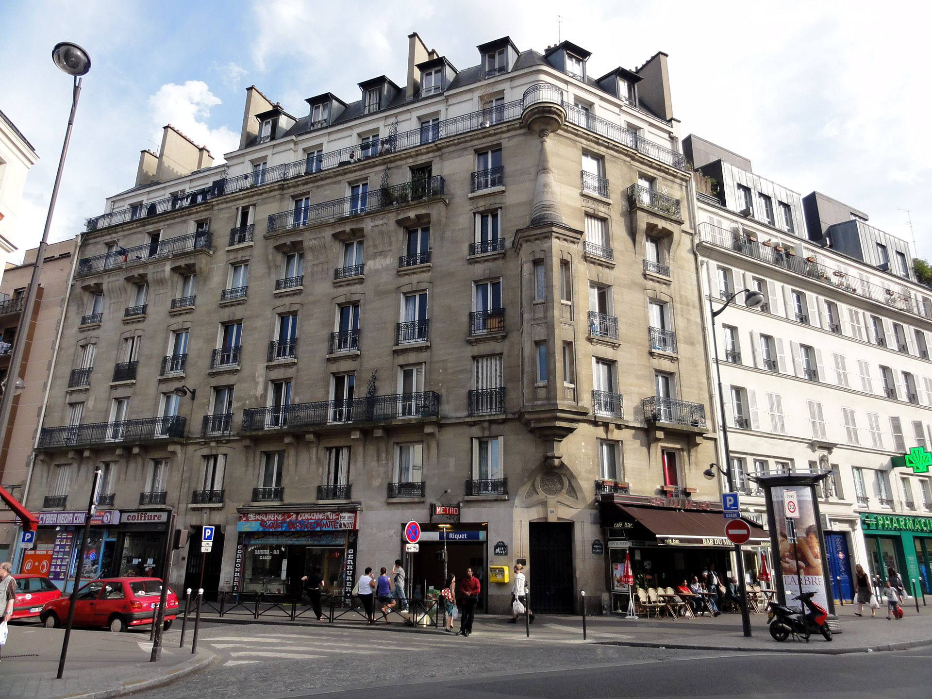 Entrée de la station Riquet de la ligne 7 du métro de Paris, France.